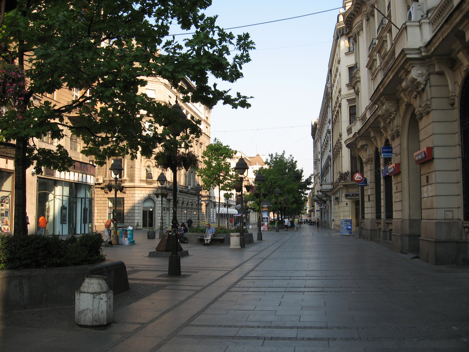 Ulica Knez Mihailova, Belograd